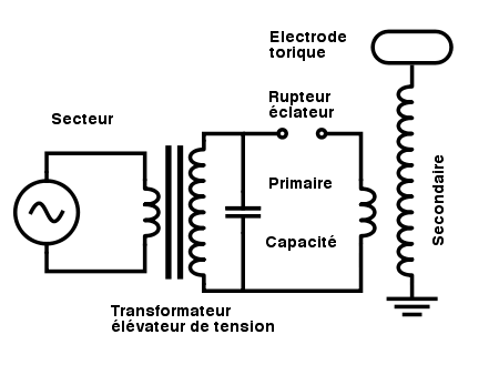 Variante du circuit du transformateur de Tesla